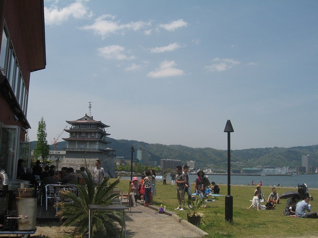 大津なぎさ公園から見た比叡山と琵琶湖